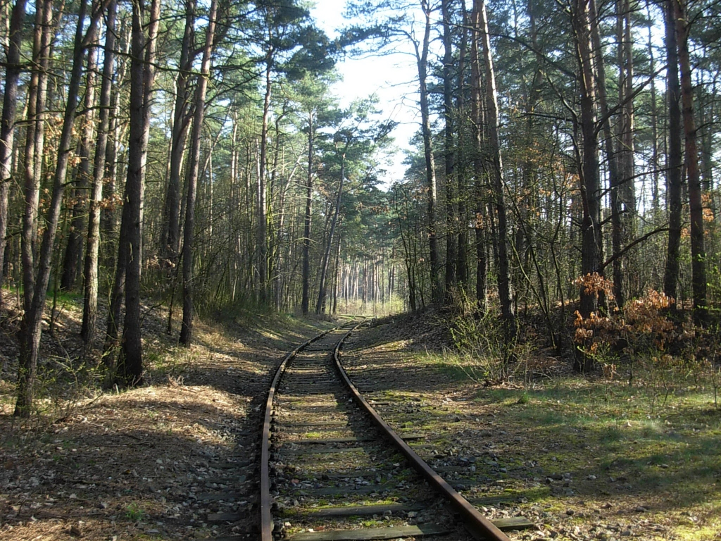 Las Osowa Góra-Czyżkówko w Bydgoszczy